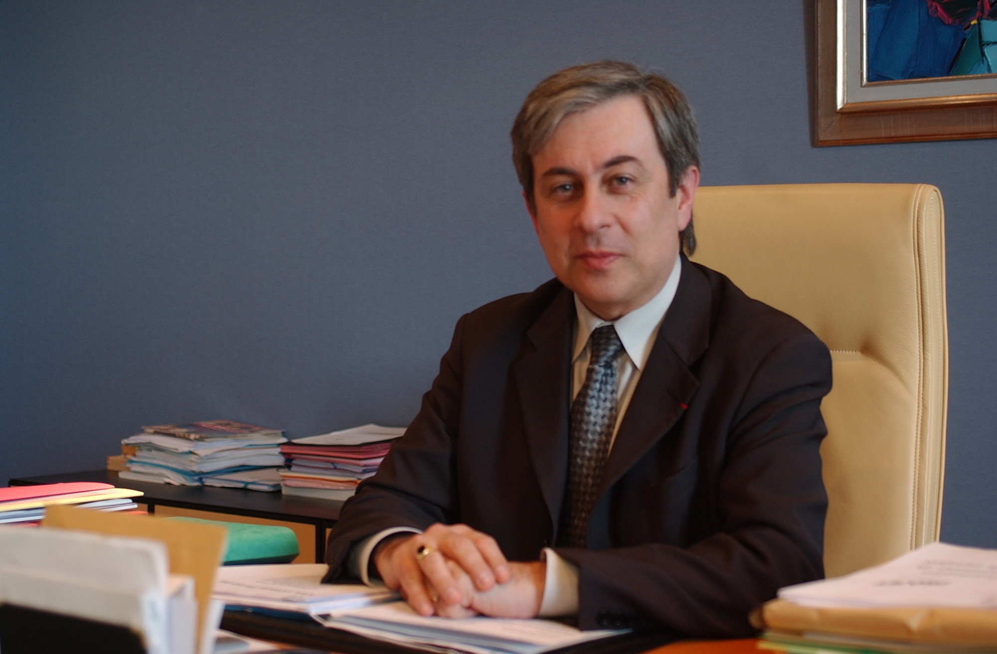 Ange Santini, Président du Conseil Exécutif de Corse